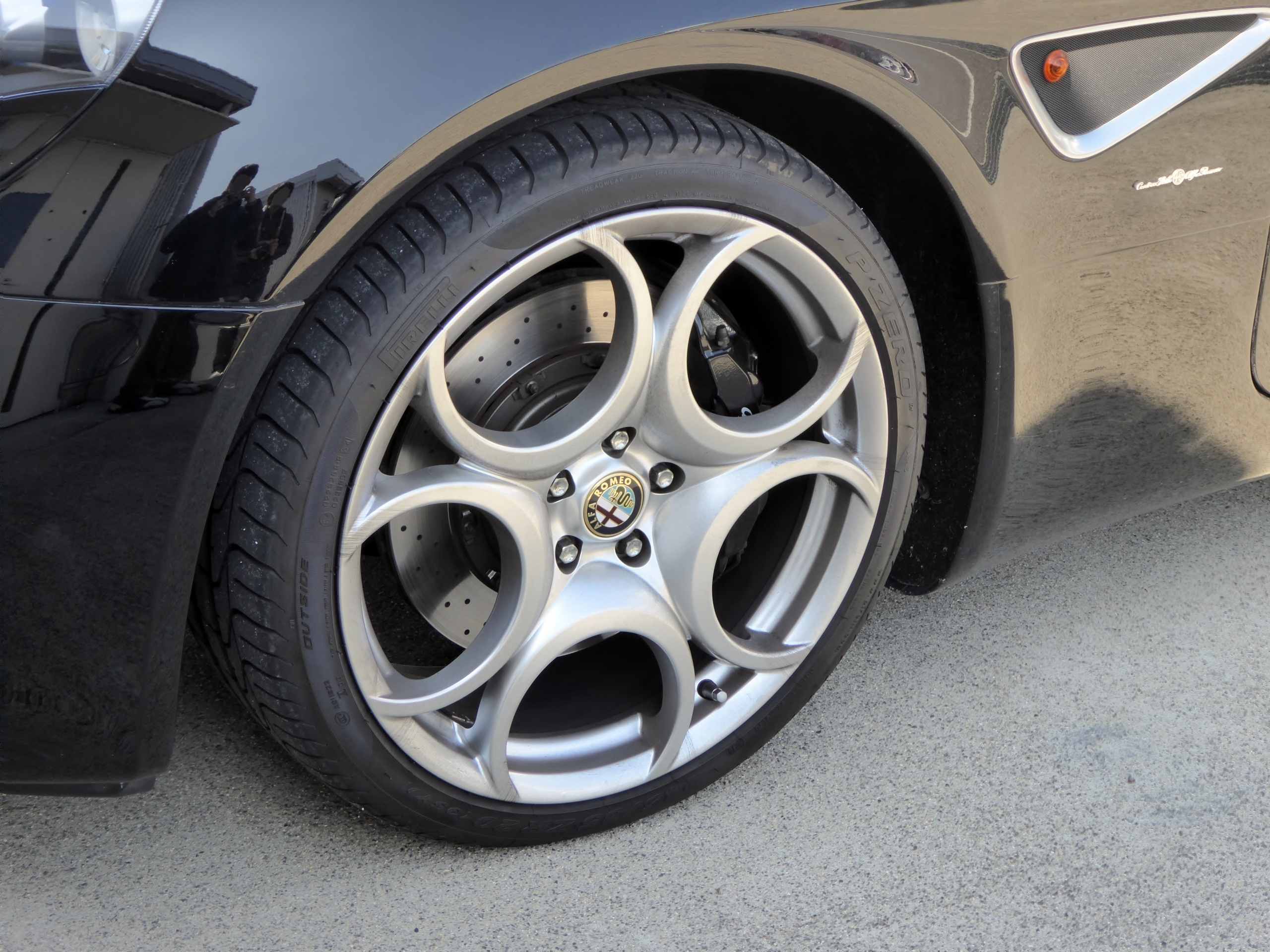 アルファロメオ・8Cコンペティツィオーネのホイールを撮影。